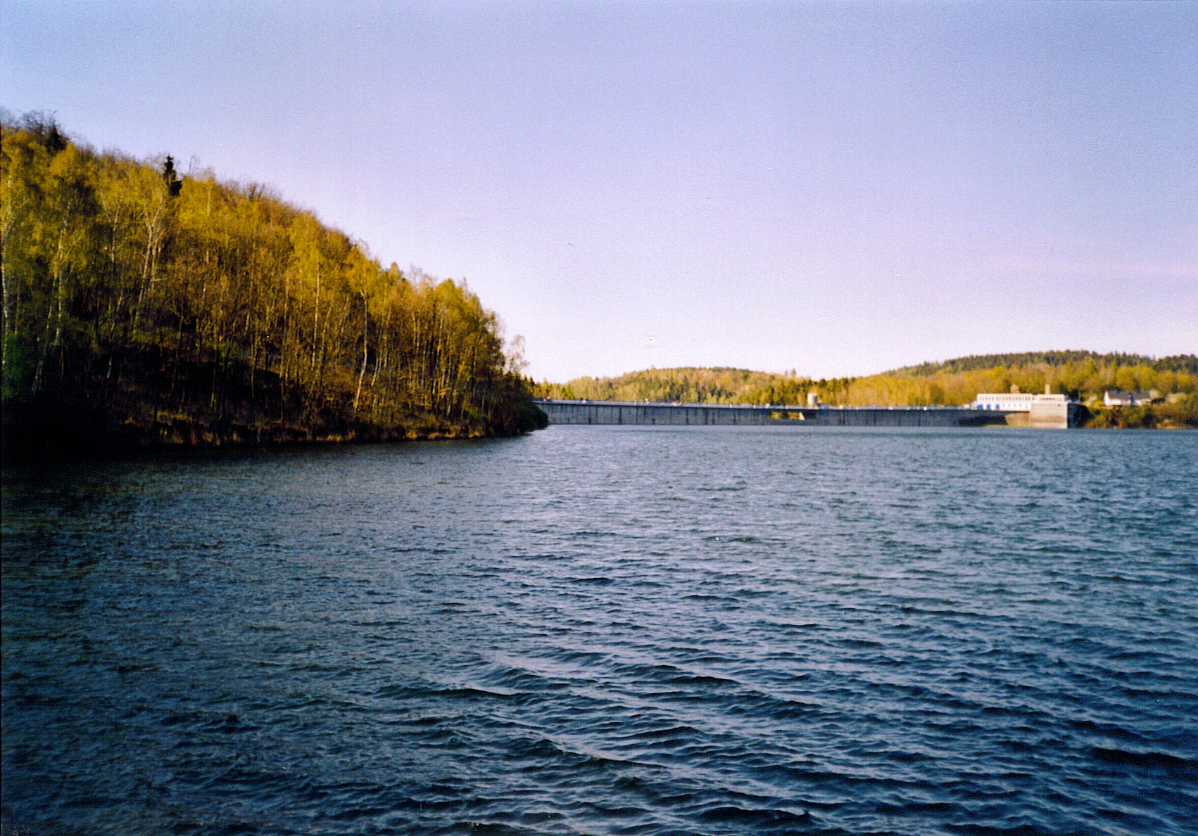 Blick auf die am nördlichen Ende der vogtländischen Talsperre Pöhl gelegene Staumauer, hinter jener der Ort Jocketa liegt